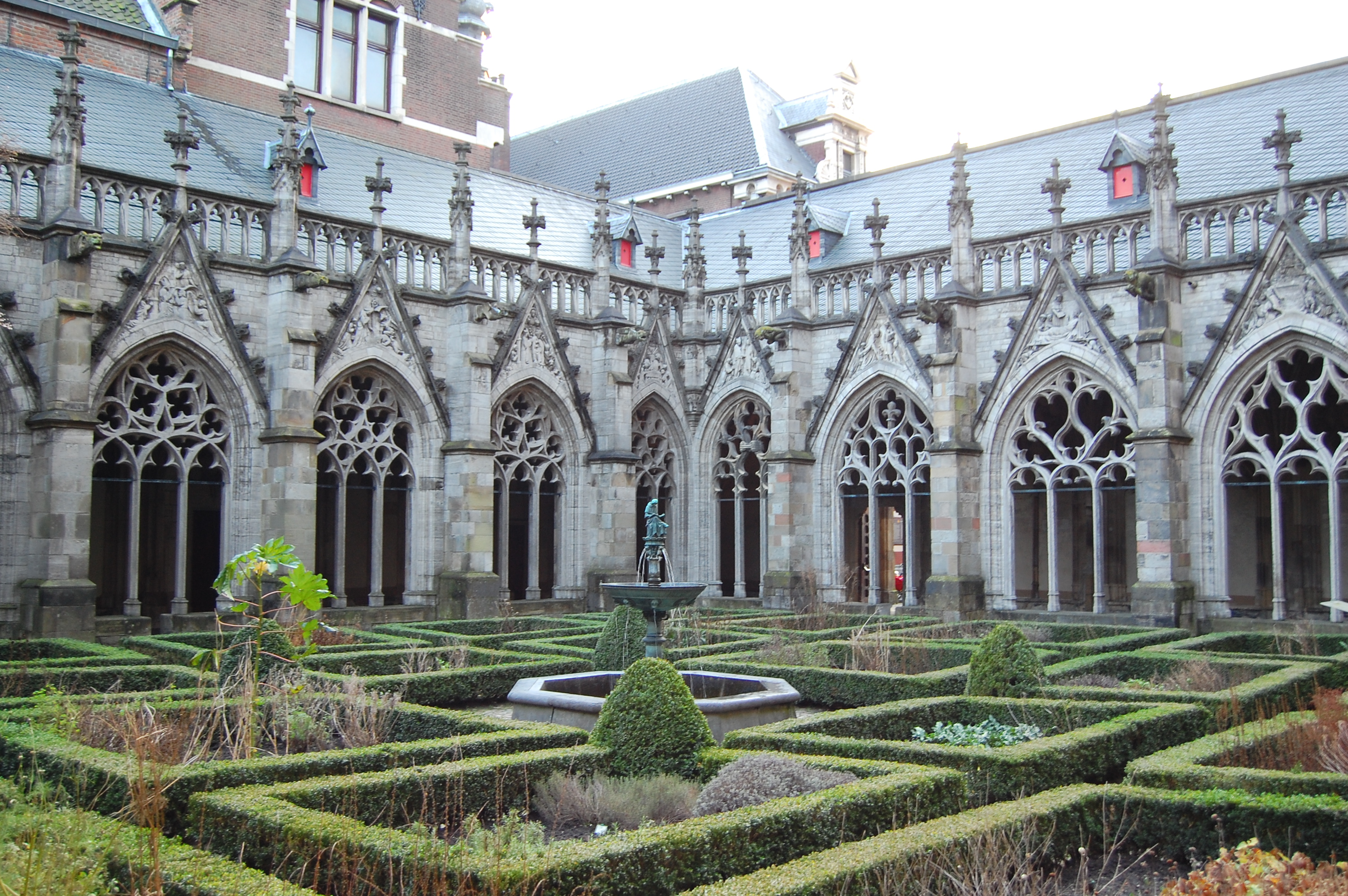 Utrecht